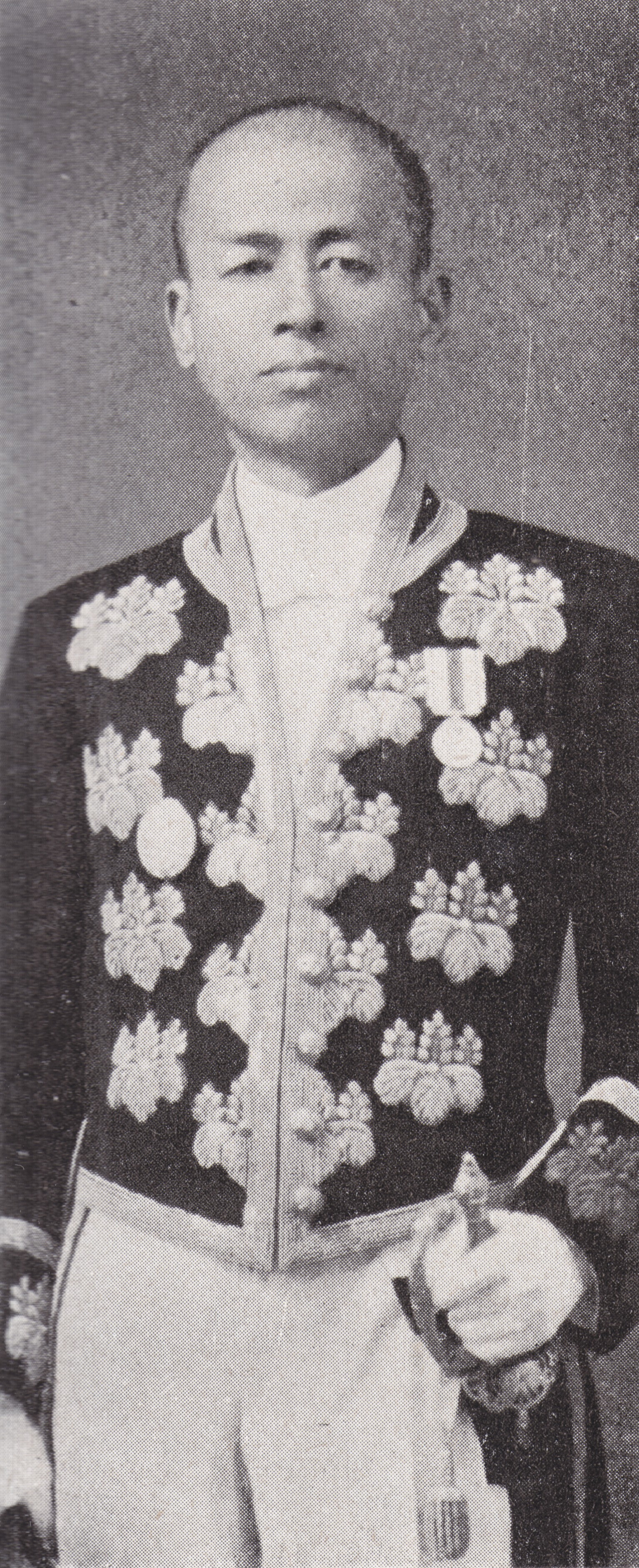 大礼使典儀官金子有道